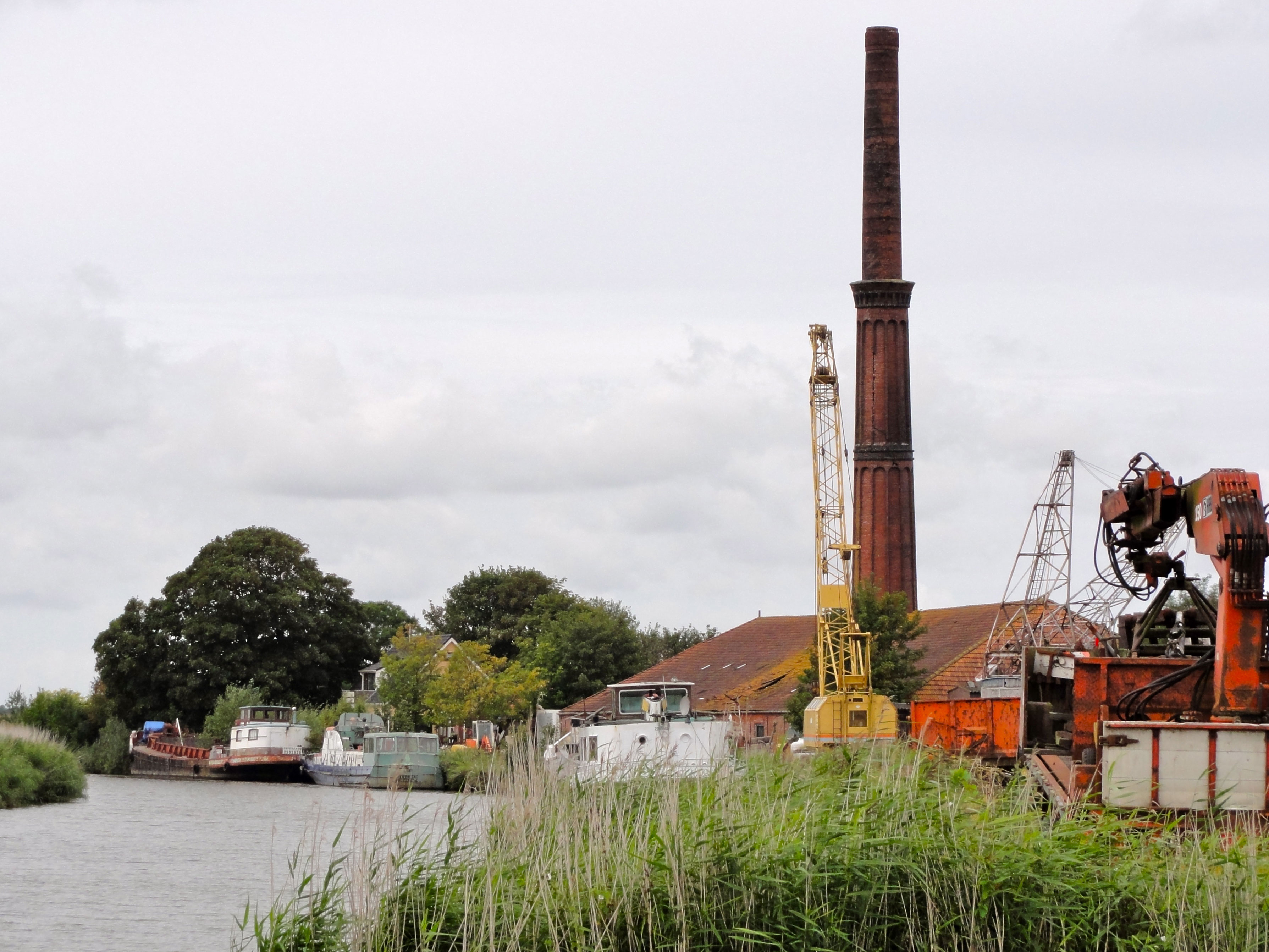 Oude steenbakkerij van Oostrum